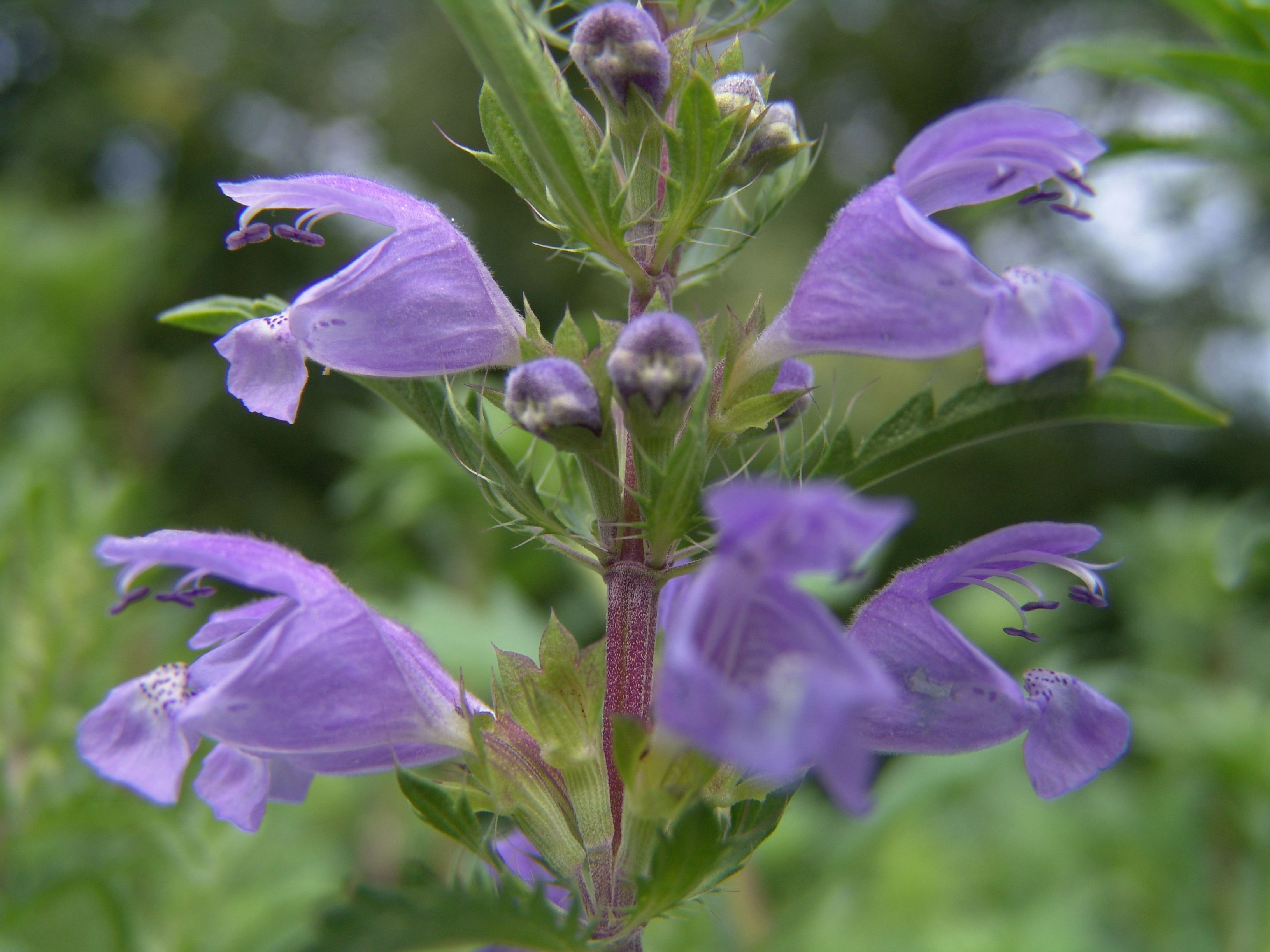 Ein Blütendetail des als Gewürzkraut verwendeten türkischen Drachenkopfes